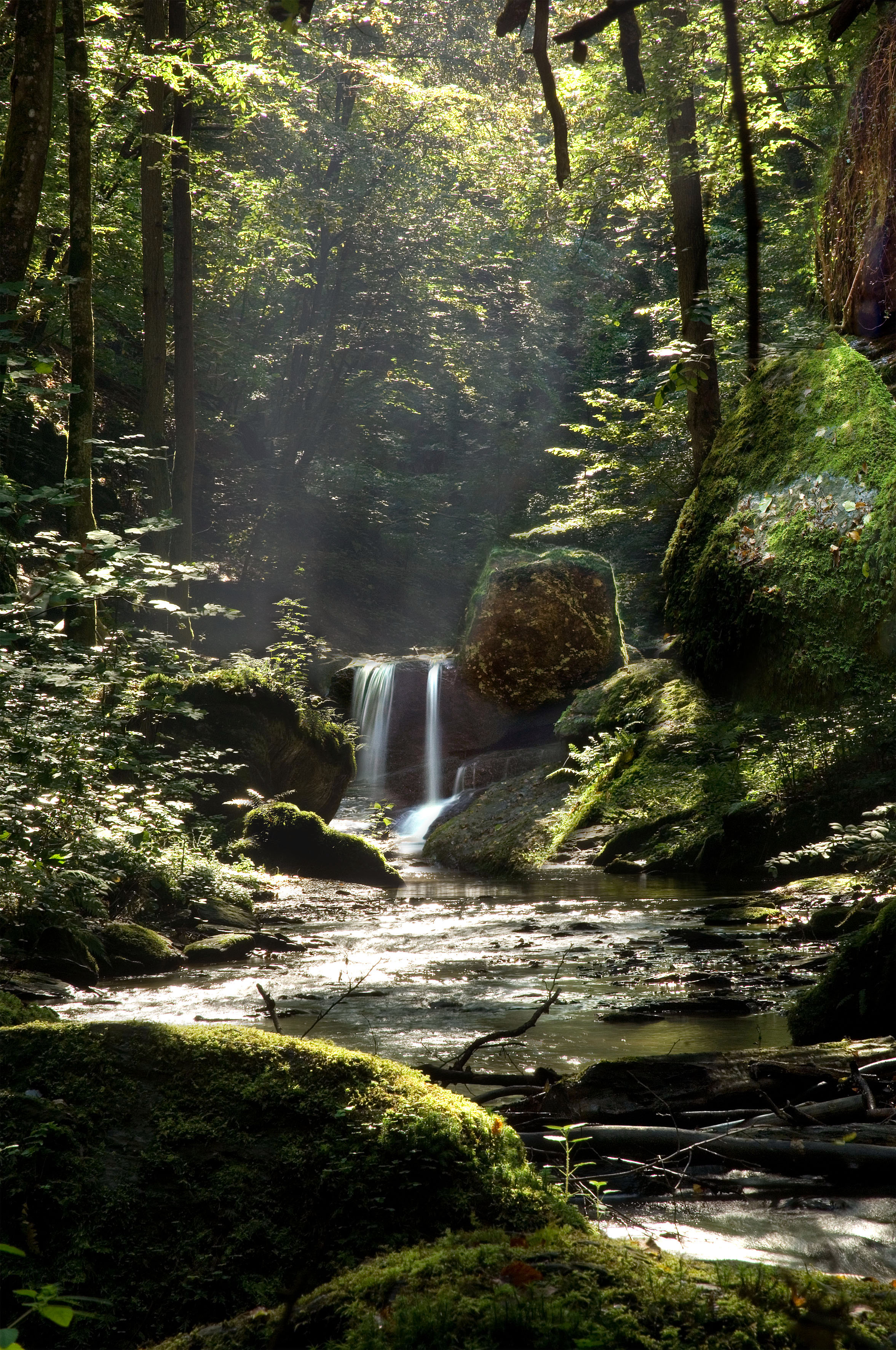 Felspassage und Wasserfall des Ehrbachs